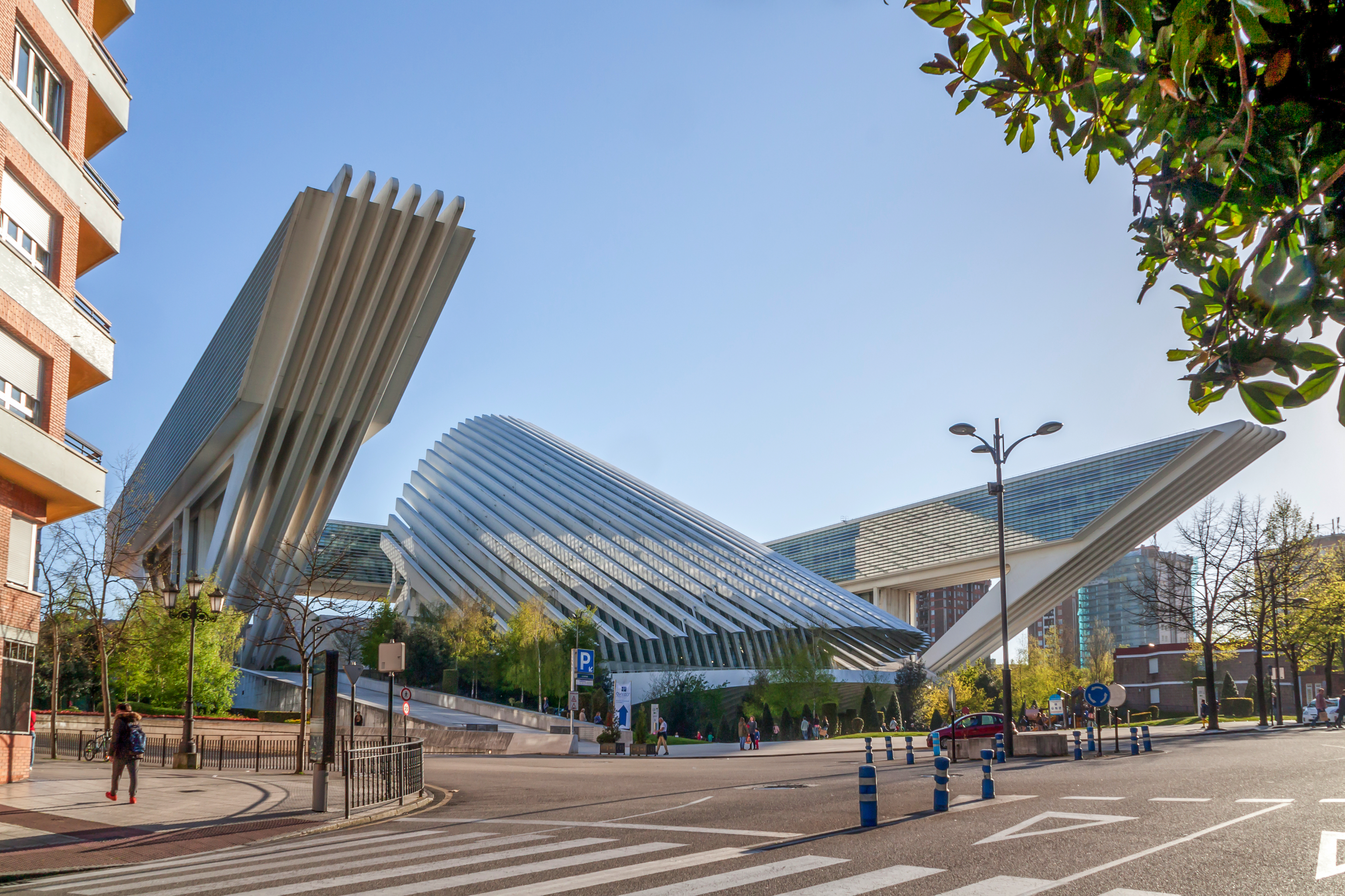 Oviedo, de ayer a hoy.